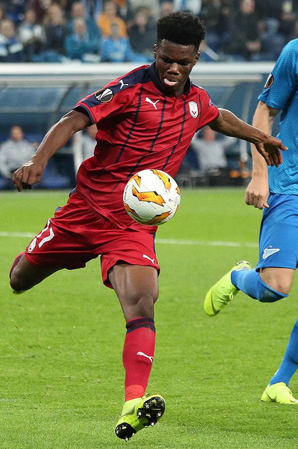 «Зенит» обыграл «Бордо», вырвав победу на последних минутах